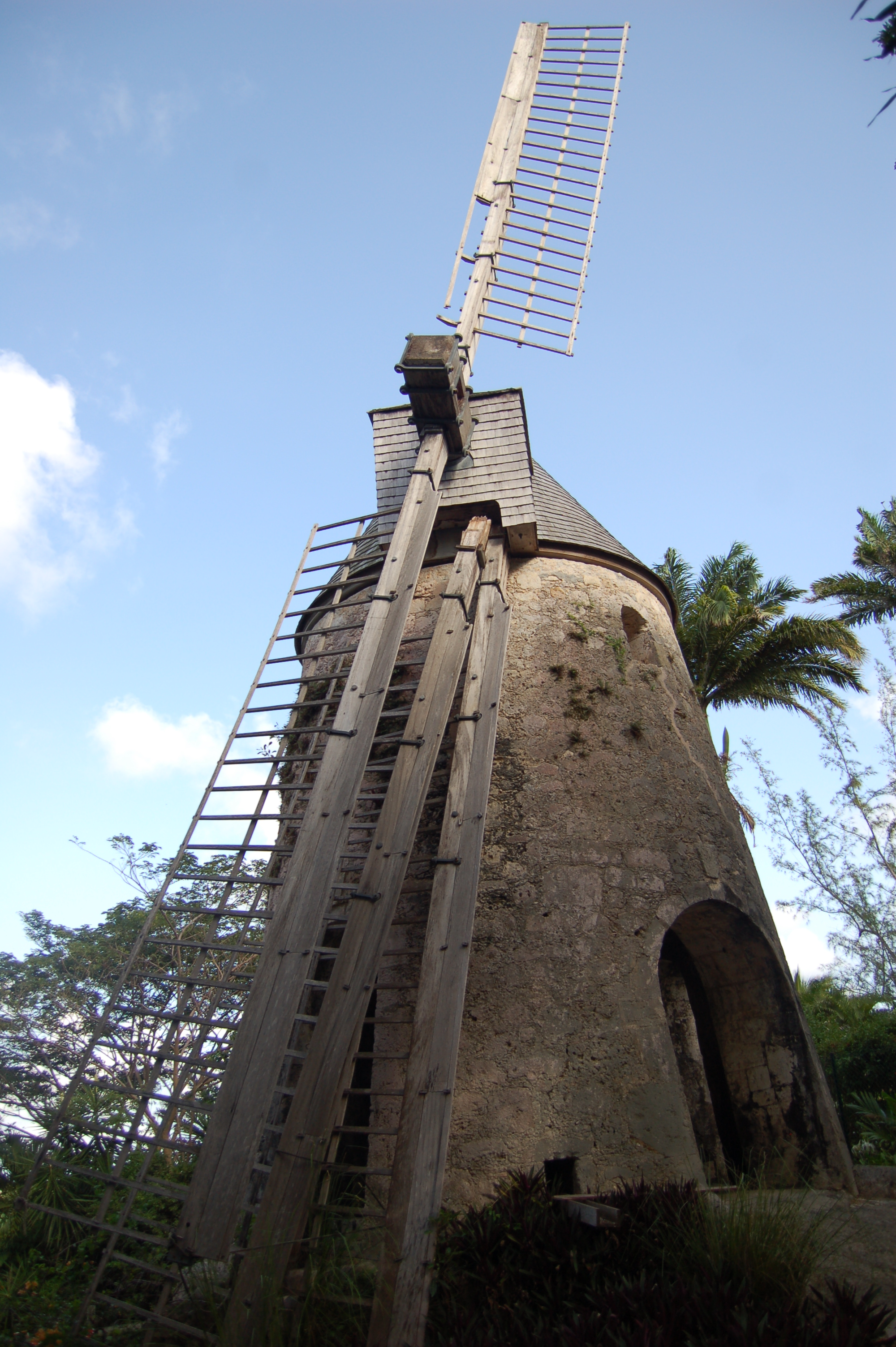 Moulin à vent au sein de la distillerie de rhum Damoiseau, Le Moule, Guadeloupe